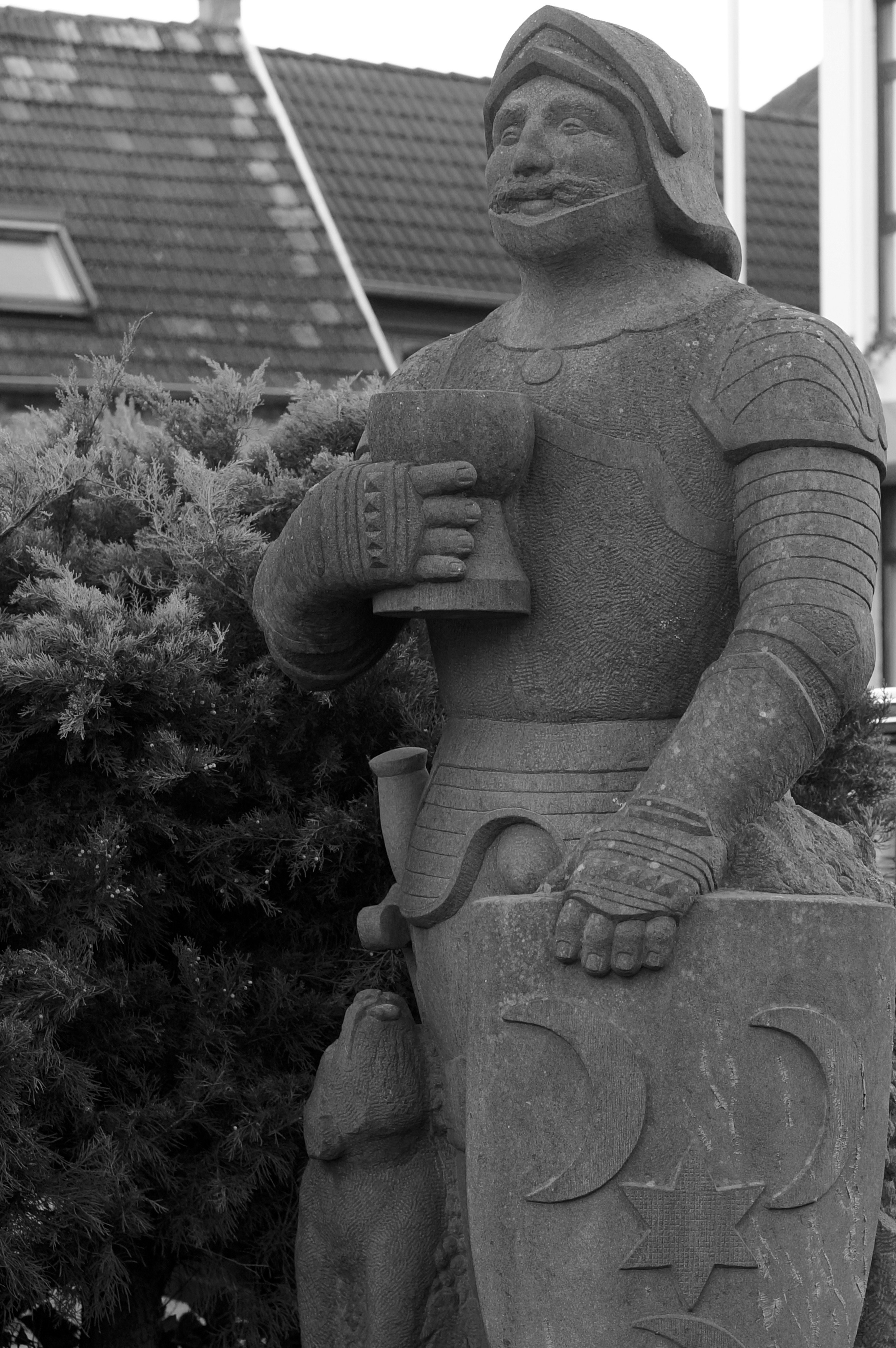 Standbild Ritter Hundt Niedersaulheim